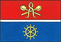 Vlajka, Stará Huť, okres Příbram